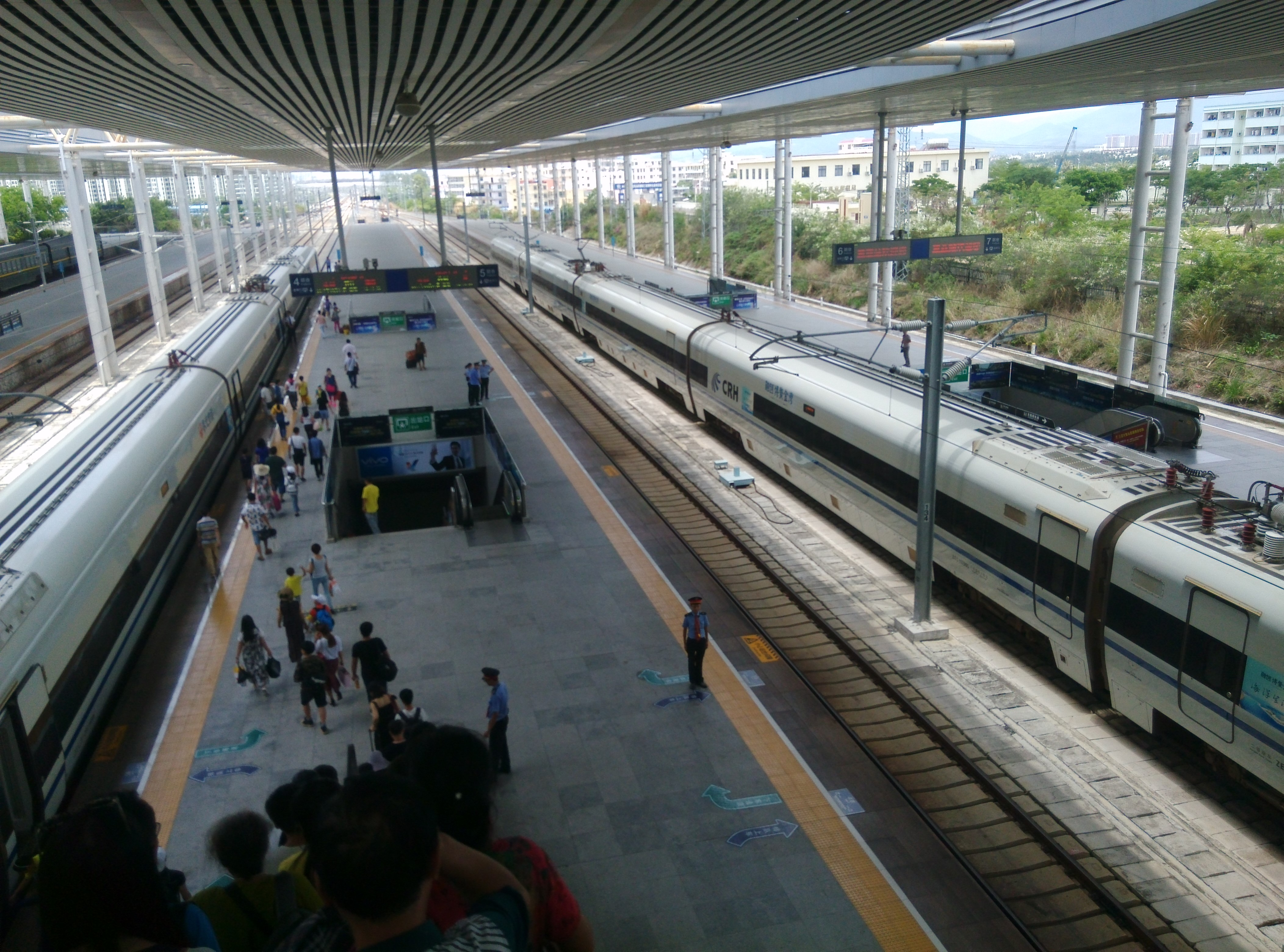 三亜駅プラットホームの様子。